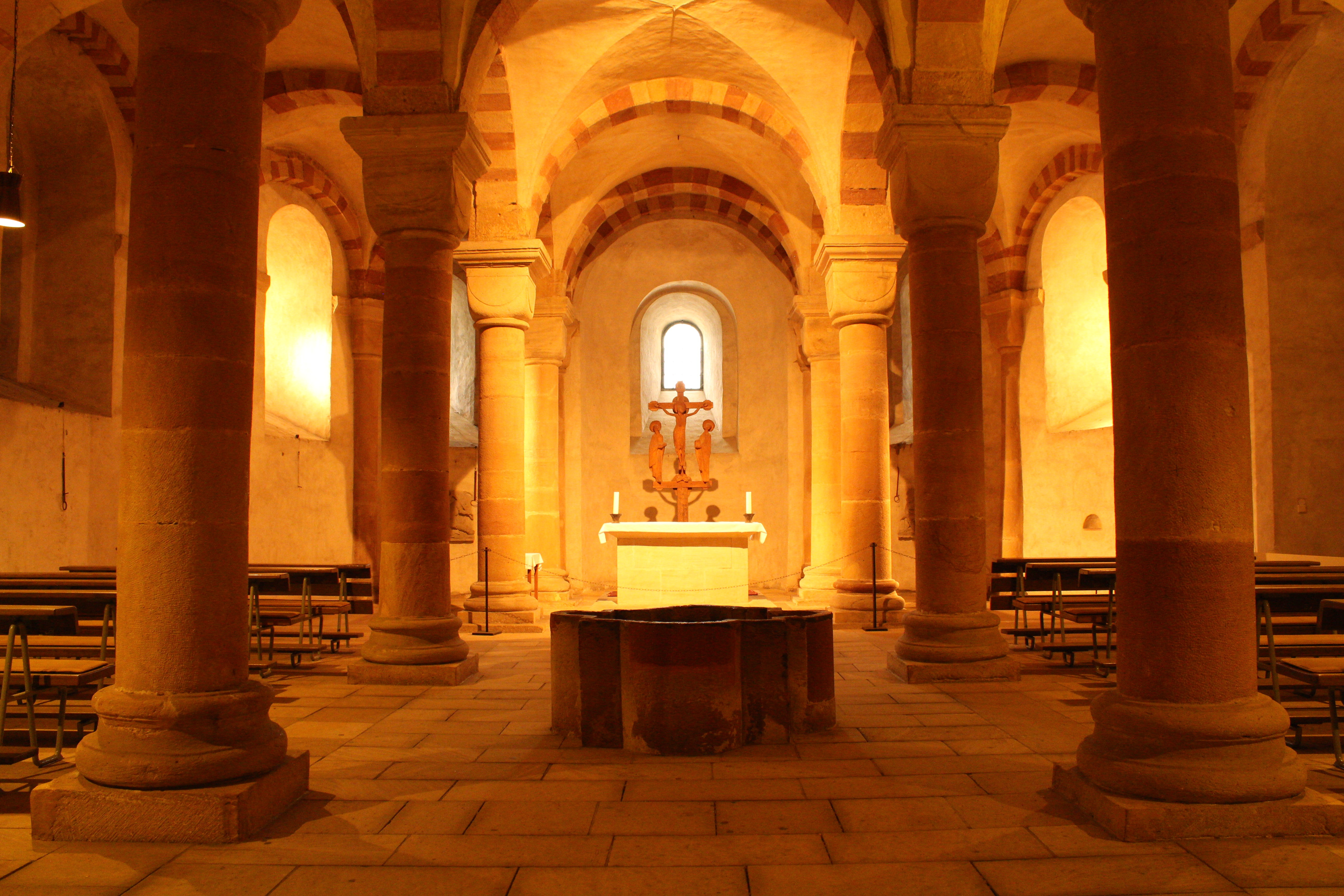 Der Dom zu Speyer wurde 1030-1124 erbaut.